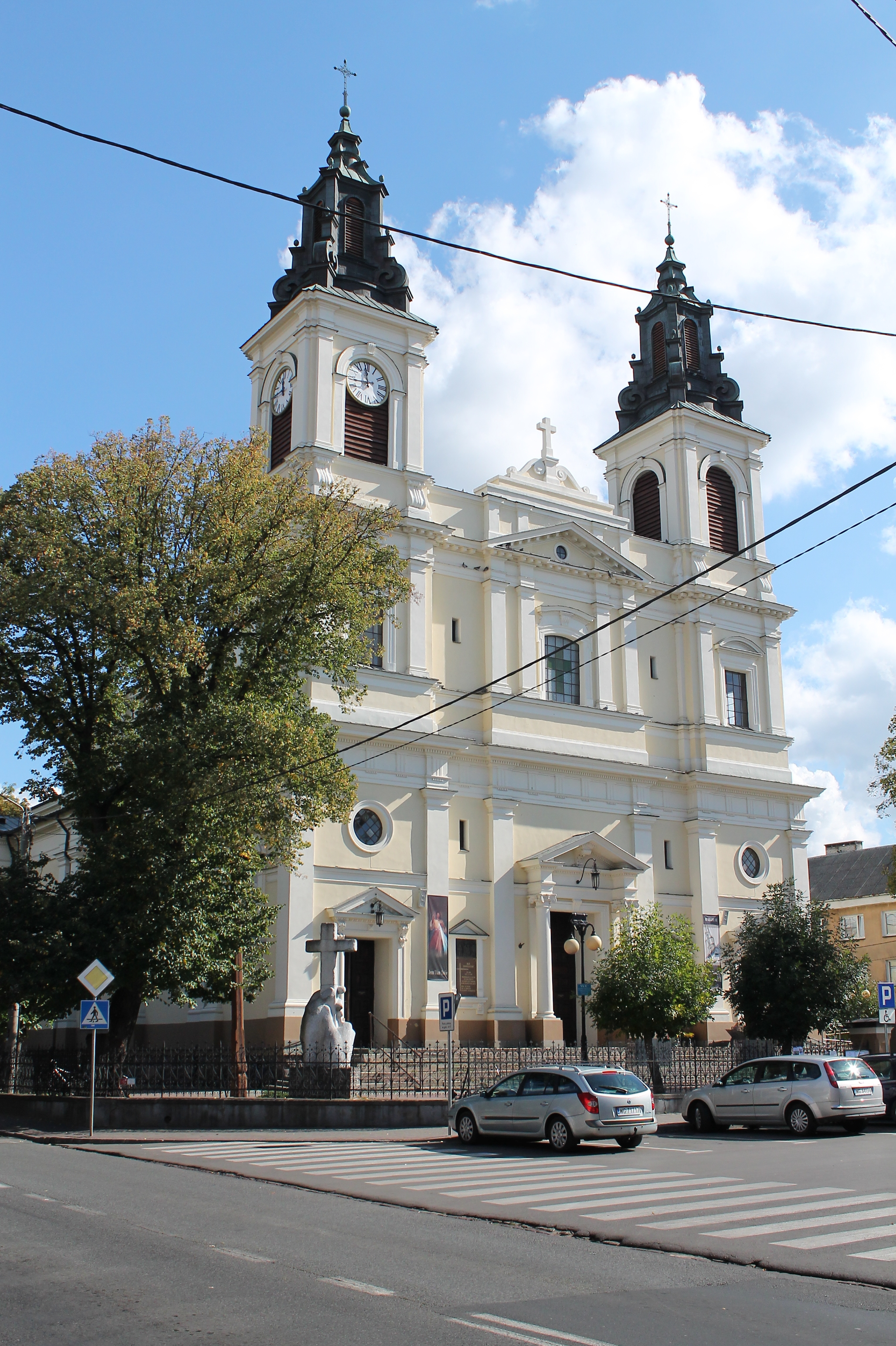 Kościół p.w. Przemienienia Pańskiego w Garwolinie ujęty z lewego boku. (zabytek nr 741 z 7.05.1962)